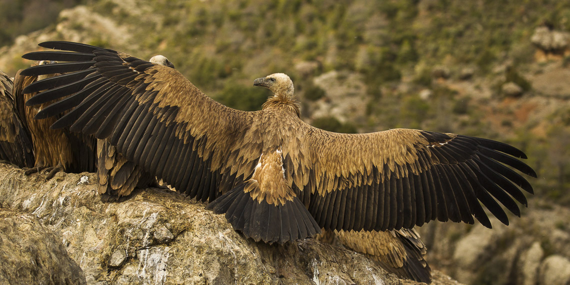 Vautour fauve (Gyps fulvus) vers Sant Martí de Canals, Conca de Dalt, Catalogne